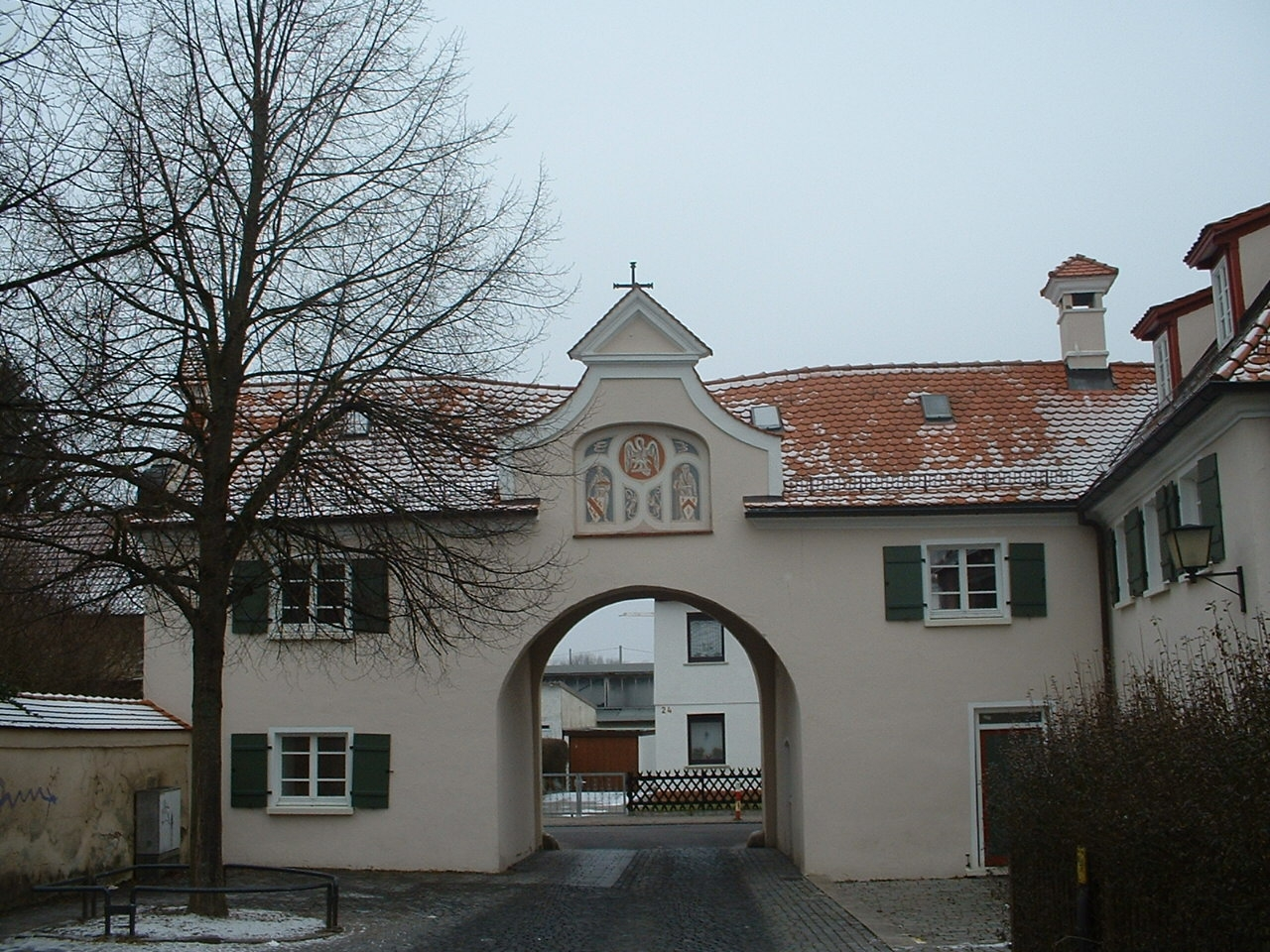 Söflingen Abbey, gate